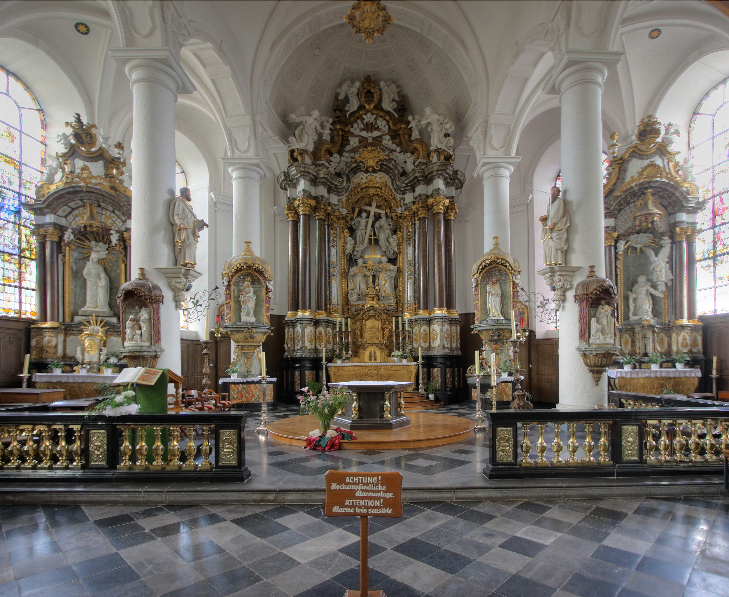 St.-Nikolaus-Kirche in Eupen, Altar